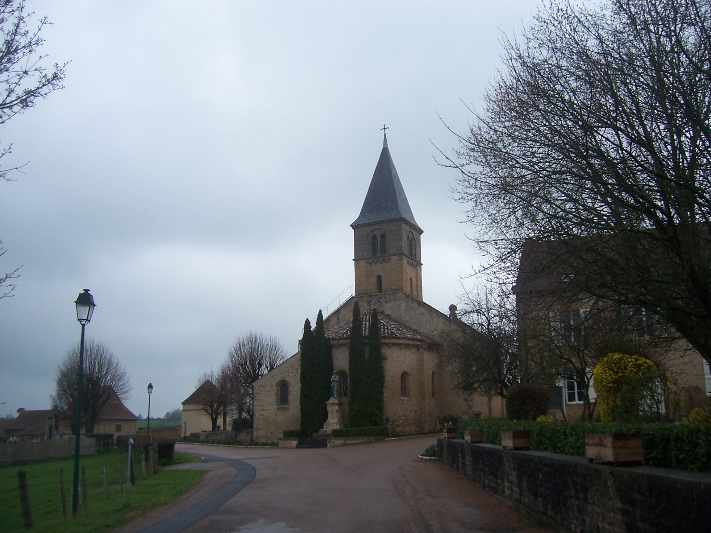 Eglise de Champlecy